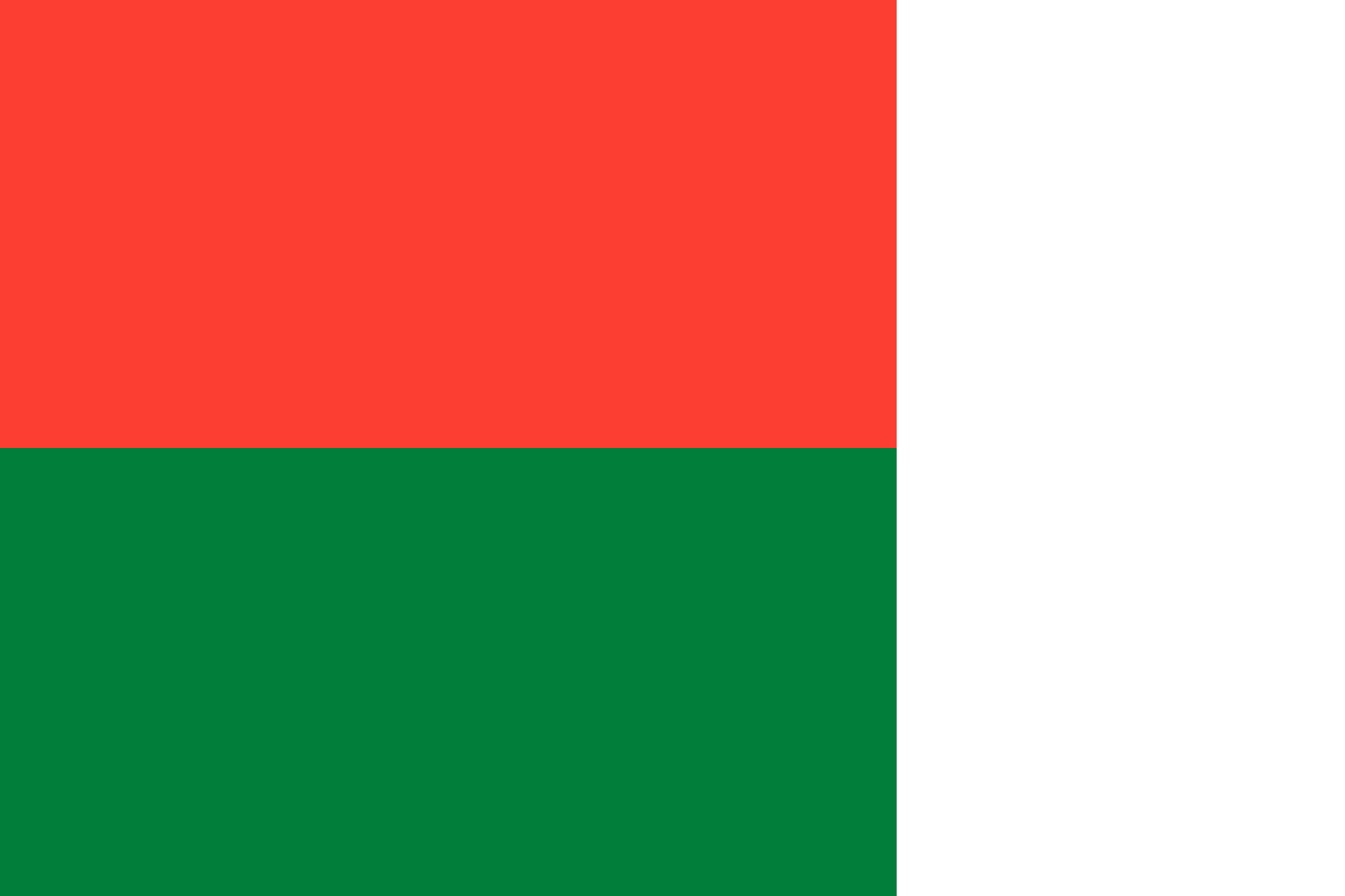 Flagge des Sultanats Occussi-Ambeno (Mikronation), laut FOTW